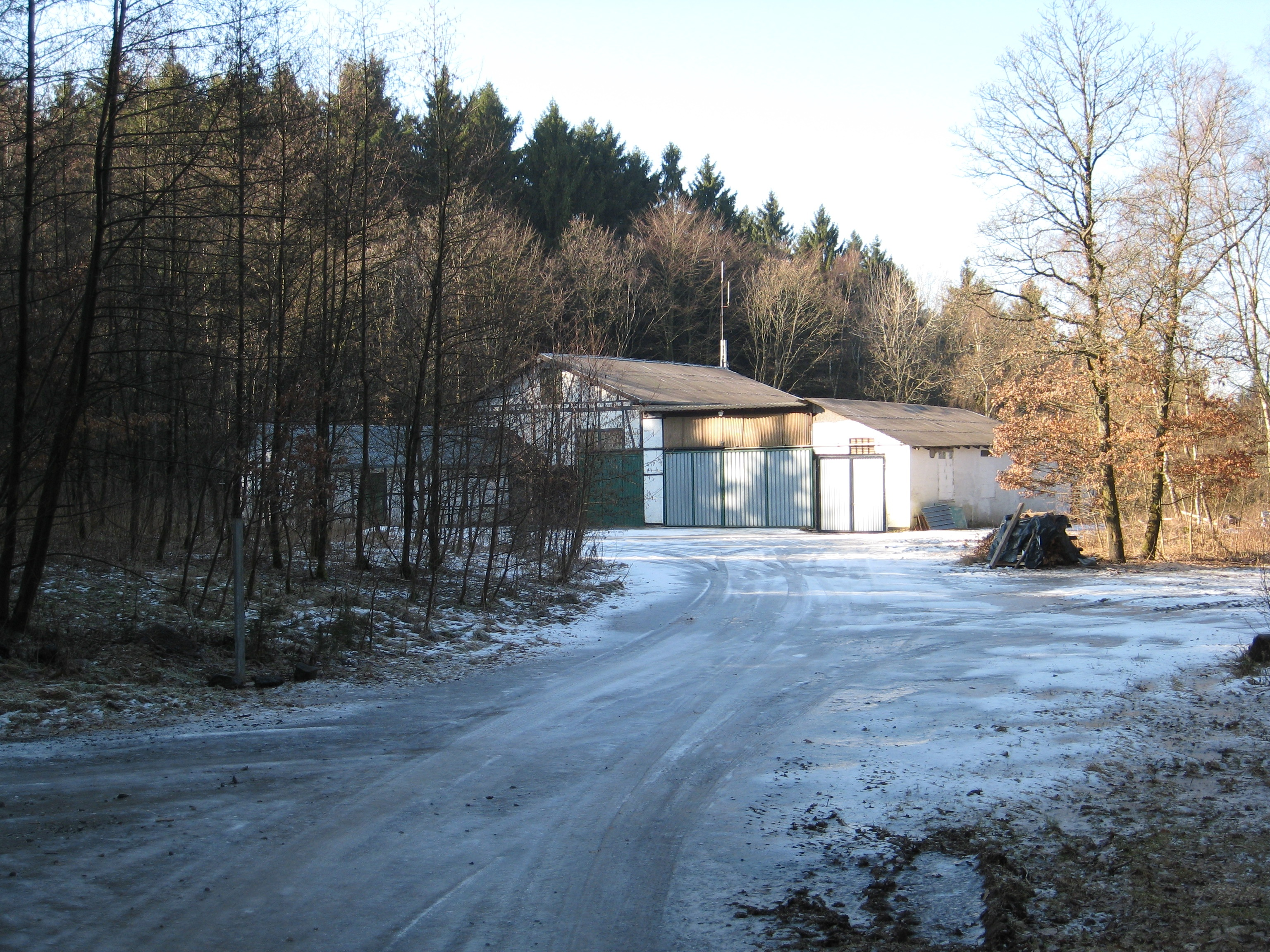 Das ehem. Gelände des „Adolfschachtes“ (Siegen-Eiserfeld) am Pfannenberg.